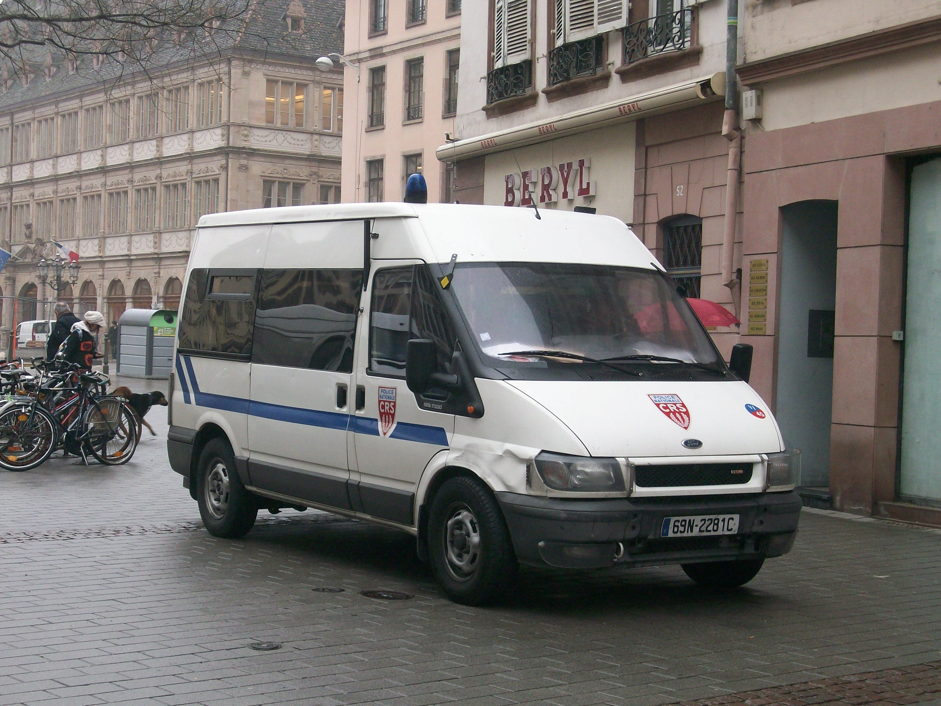 Patrouille de CRS dans un Ford Transit, rue des grandes arcades à Strasbourg